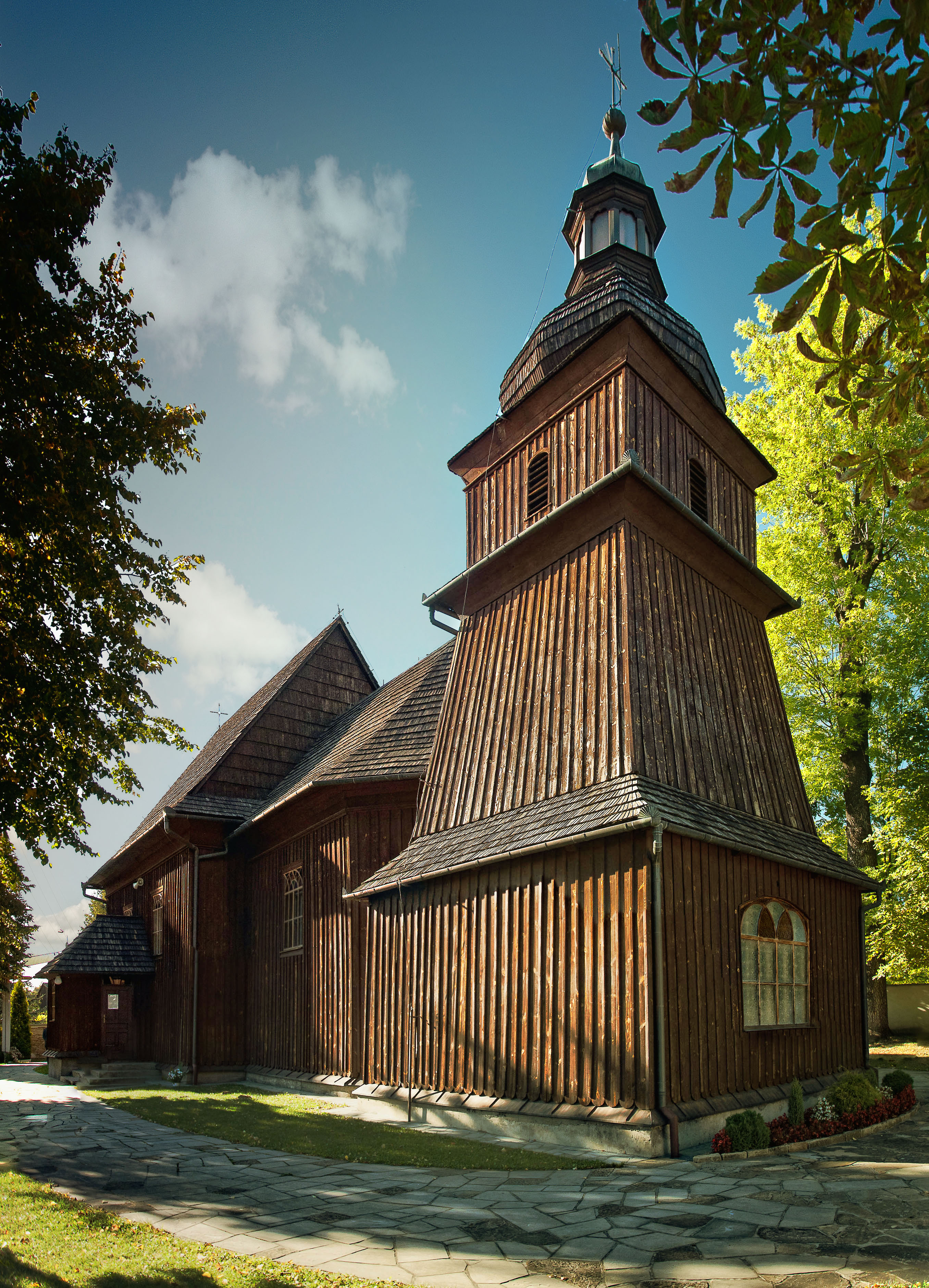 Barwałd Dolny - kościół św. Erazma